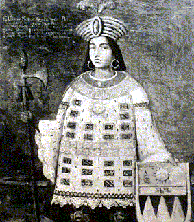 Tupac Amaru, old painting.